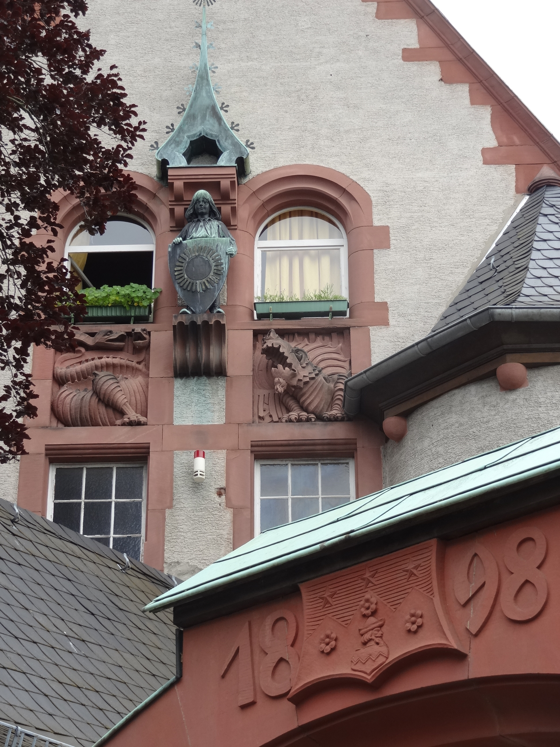 Haus Haardteck, Herdweg 79 in Darmstadt